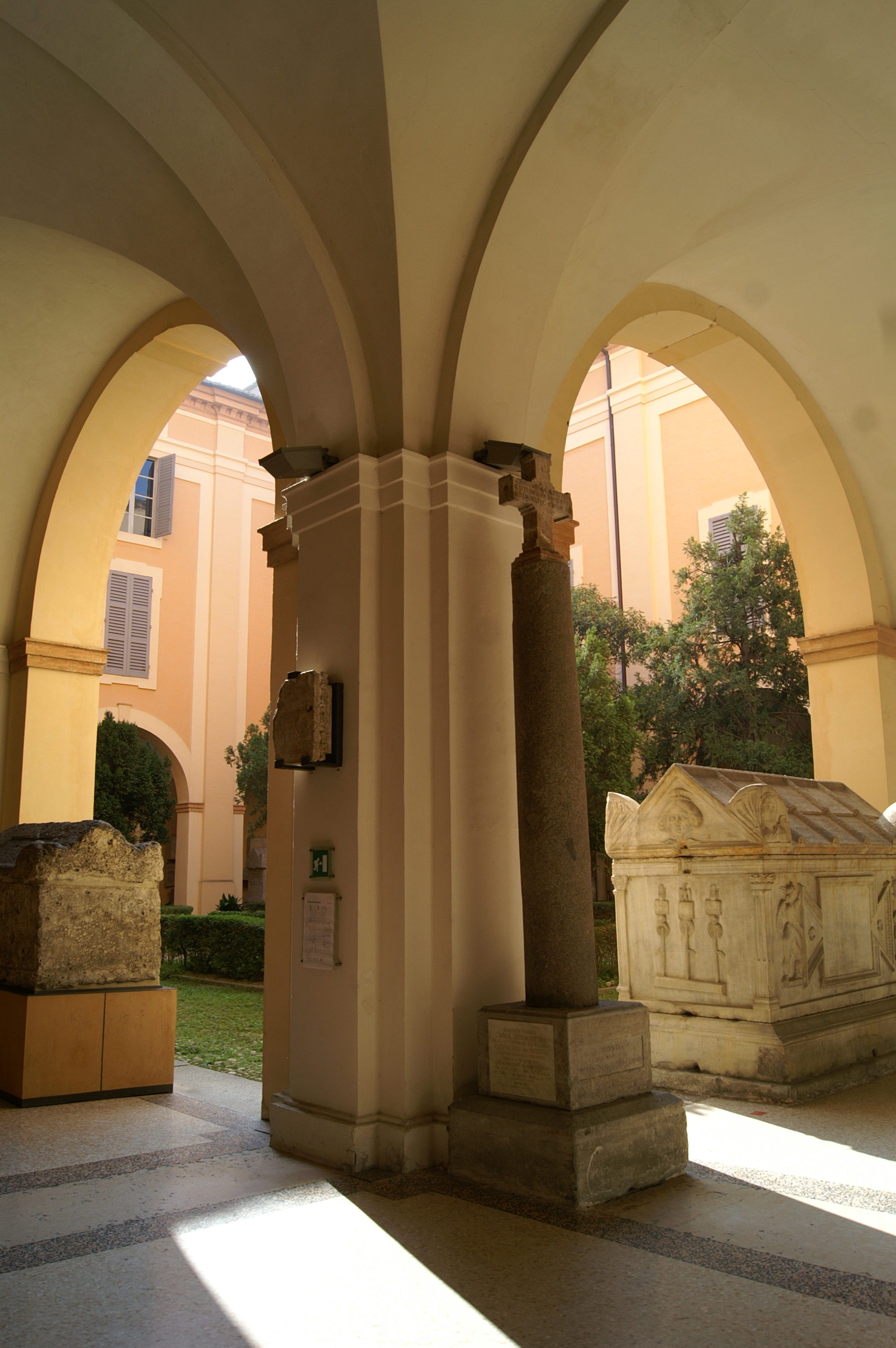 Colonna medievale di crocevia conservata al museo lapidario estense